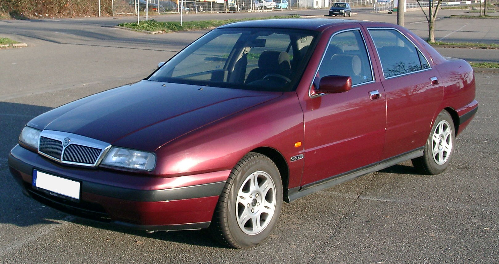 Lancia Kappa, Baujahr 1996